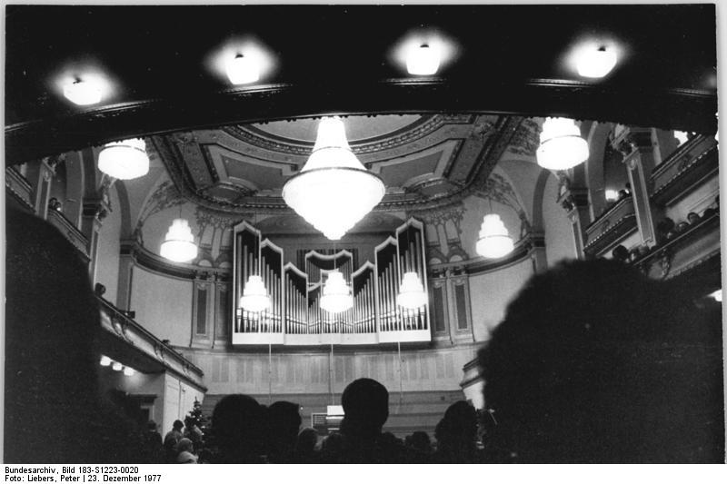 Gera, Theater, Orgel ADN-ZB Liebers-23.12.77 Gera: Eine neue Konzertorgel wurde am 21.12.77 an den Bühnen der Stadt Gera feierlich eingeweiht. Damit wurde die Rekonstruktion des Geraer Theaters abgeschlossen.